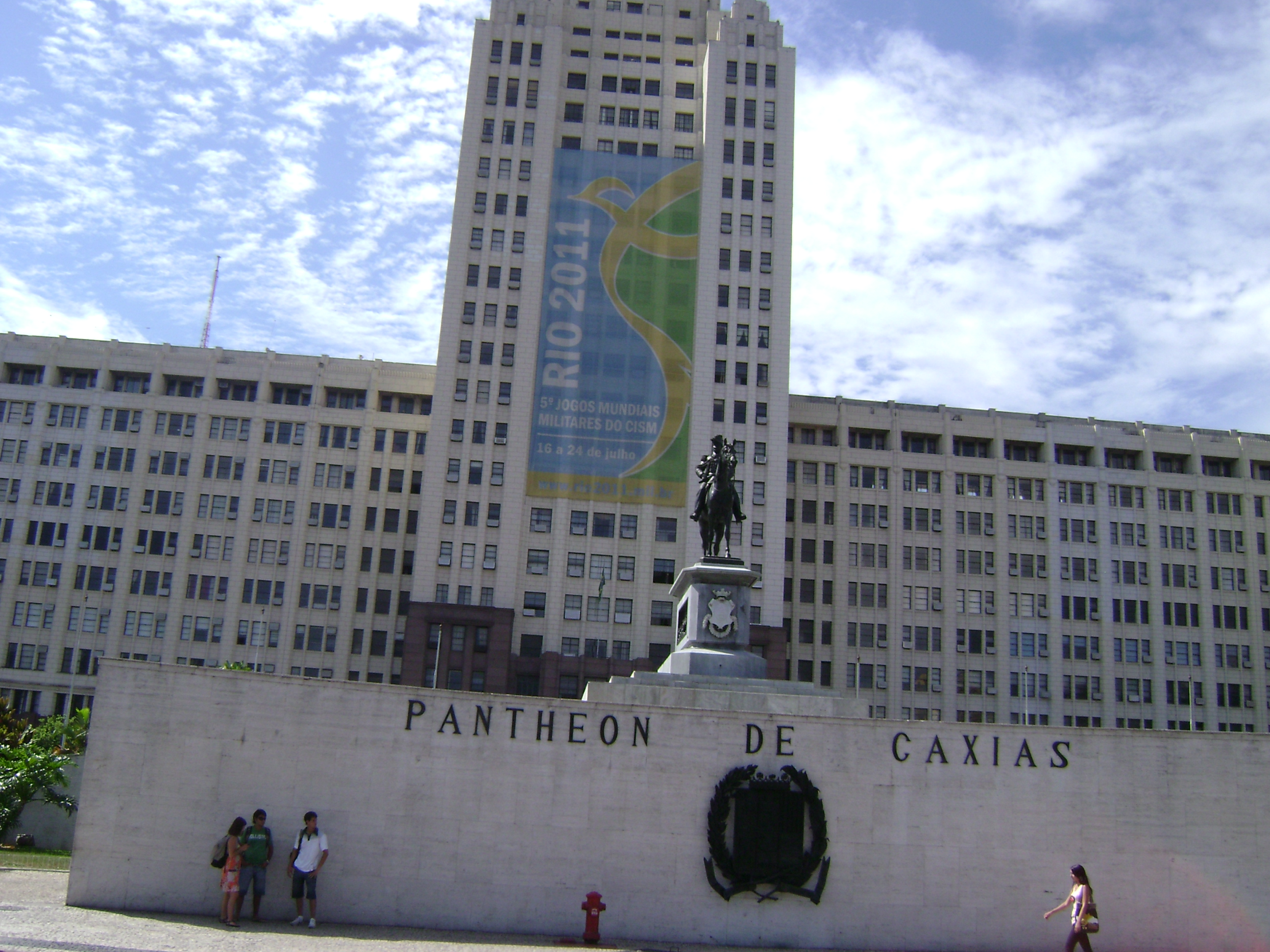 Monumento na Avenida Presidente Vargas, na cidade do Rio de Janeiro, Brasil.